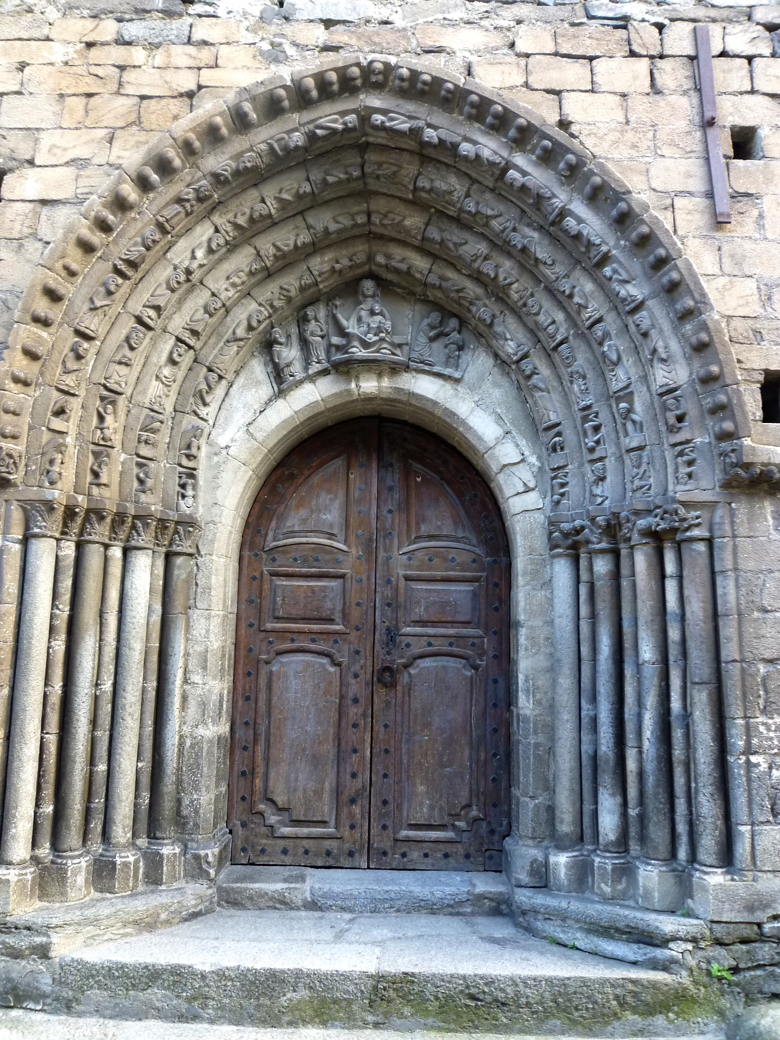 Església de Sant Esteve de Betren (Vielha e Mijaran): portal d'entrada